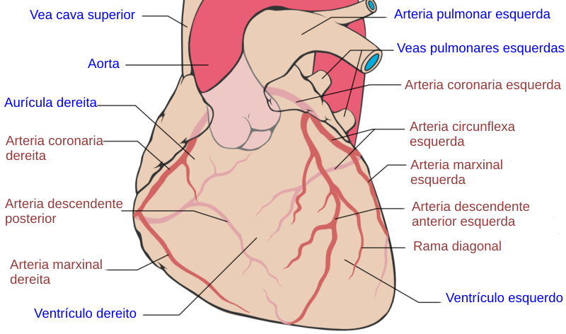 Vasos da circulación coronaria